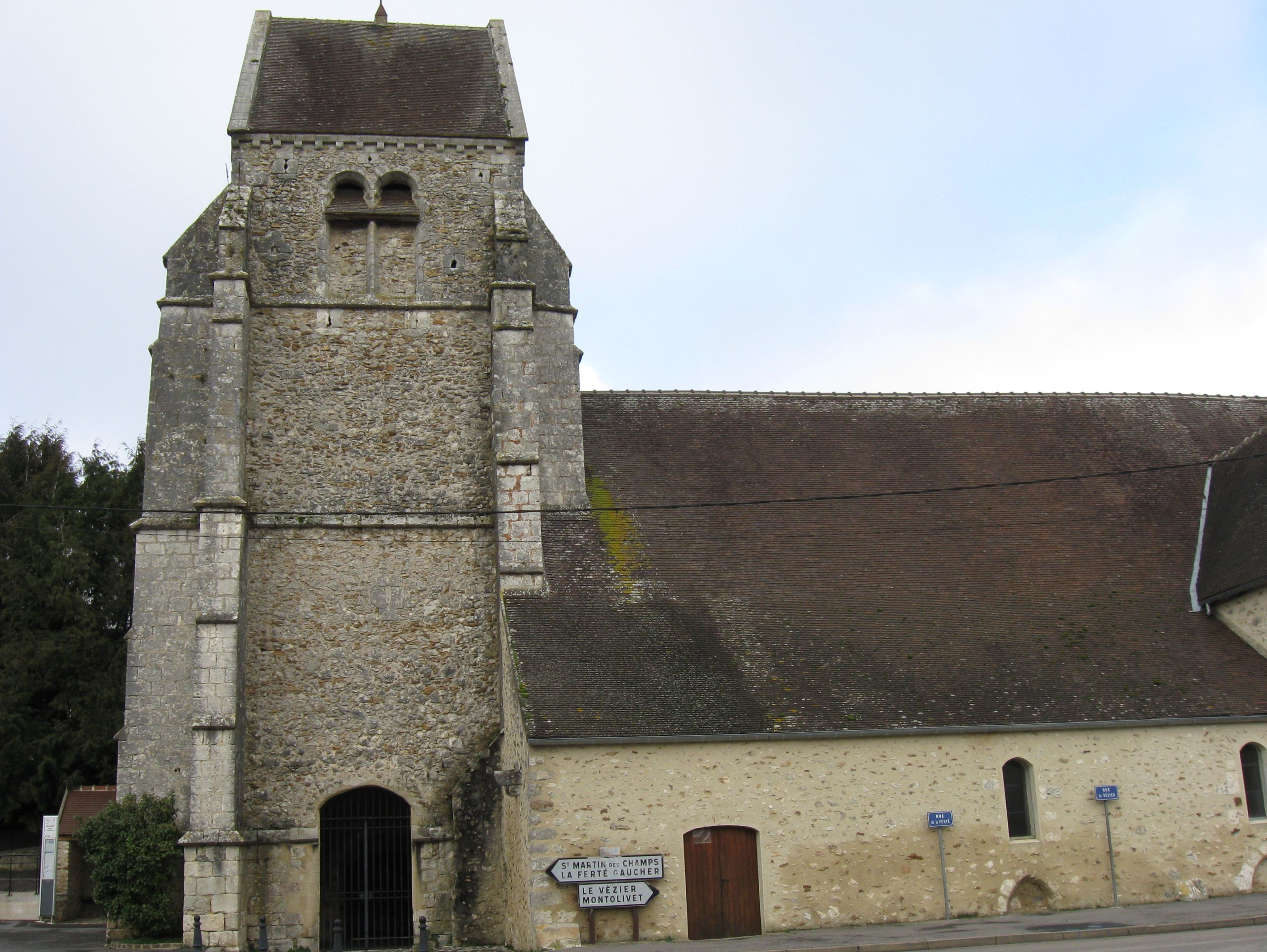 Église Saint-Pierre-Saint-Paul de Meilleray (département de la Seine-et-Marne, région Île-de-France).